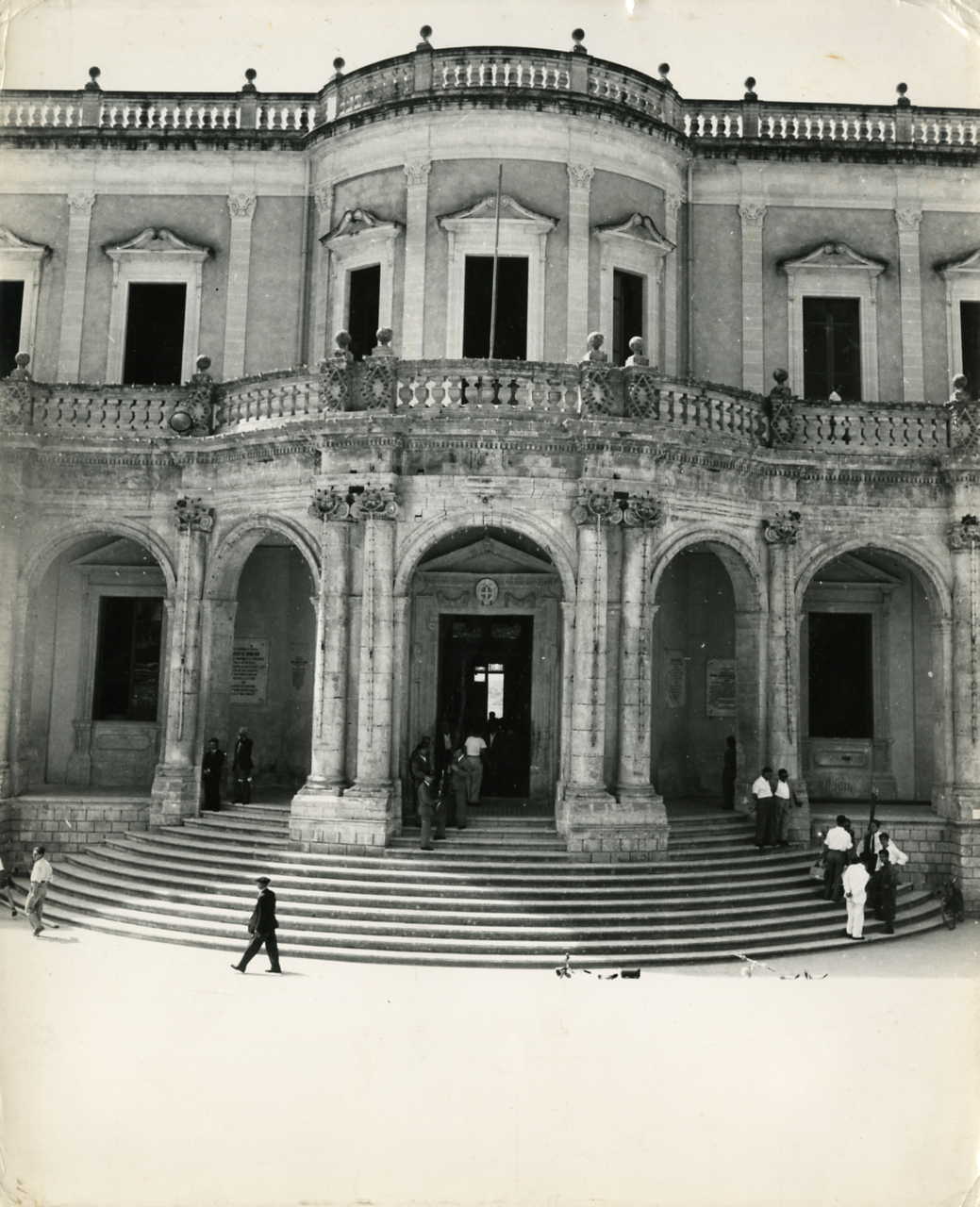 Servizio fotografico : Noto, 1953 / Enzo Sellerio. - Stampe: 2 : Positivo b/n, gelatina bromuro d'argento/ carta, 24x30. - ((Al verso delle stampe iscrizioni didascaliche manoscritte a matita; timbro a inchiostro con copyright: "Enzo Sellerio/ Copyright". - Sul coperchio della scatola iscrizione didascalica manoscritta a penna: "Sicilia/ n. 30 fotografie di Enzo Sellerio/ (1963)". - Occasione: Documentazione per una pubblicazione (mai edita) sul barocco siciliano maggiore e minore. - Fonte: Lettera di Sellerio, Enzo: Lettera/ Da Enzo Sellerio a Paolo Monti, per la casa editrice Electa (1969/03/05), presso Archivio Paolo Monti. Lettera dattiloscritta con elenco di soggetti numerati come le corrispettive stampe, ripresi tra il 1953 e il 1963 per un volume sul Duomo di Monreale (1963) e per un volume (mai edito) sul barocco siciliano maggiore e minore. - Fonte: Monografia di Kronig, Wolfgang: Il duomo di Monreale e l'architettura normanna in Sicilia, Palermo, S. F. Flaccovio (1965)